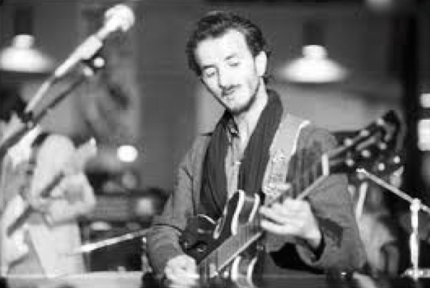 Lotfi Attar, guitariste algérien et ex leader du groupe mythique Raïna Raï.